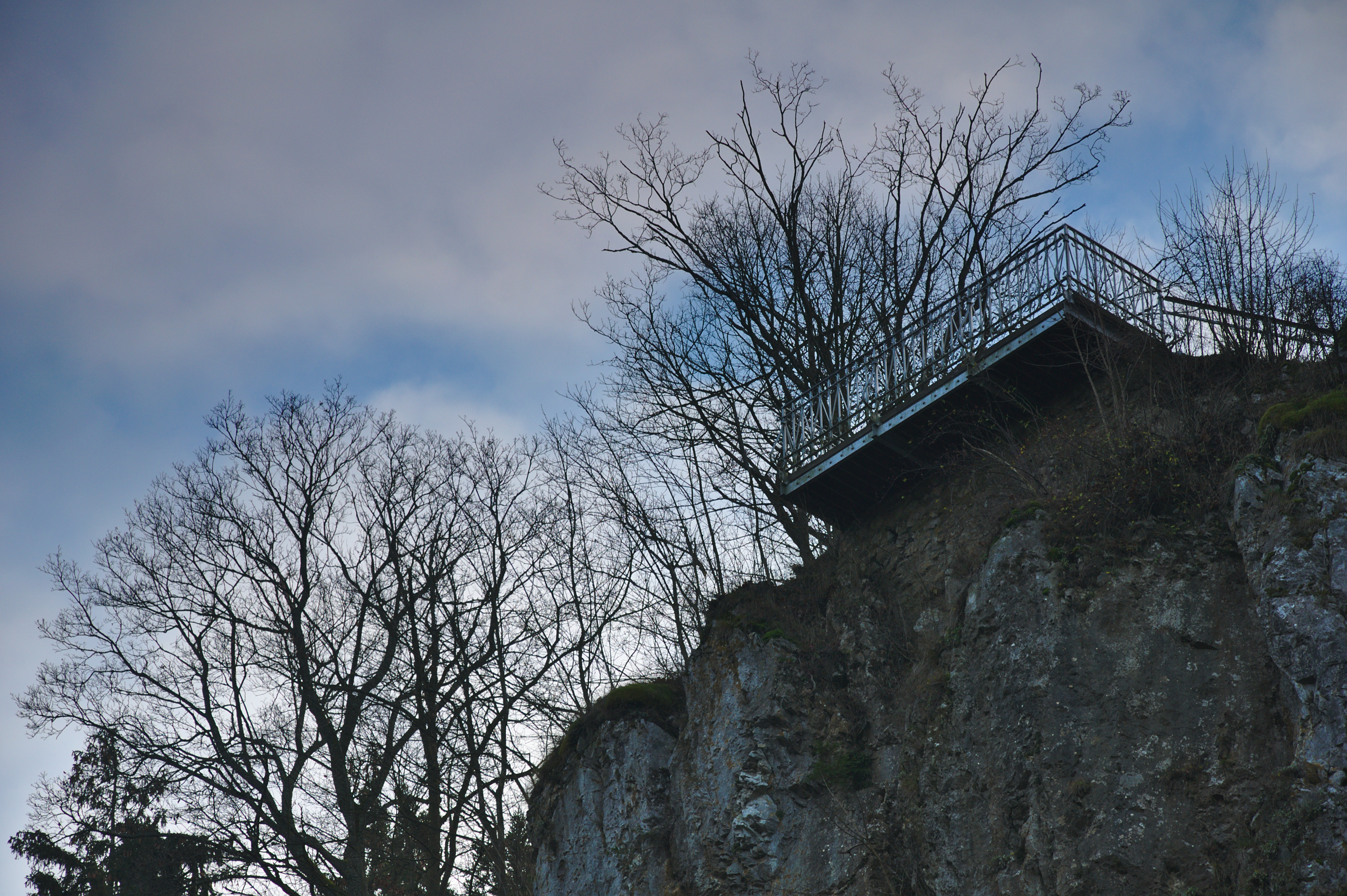 Horní můstek z Dolního můstku, Macocha, Ostrov u Macochy, okres Blansko